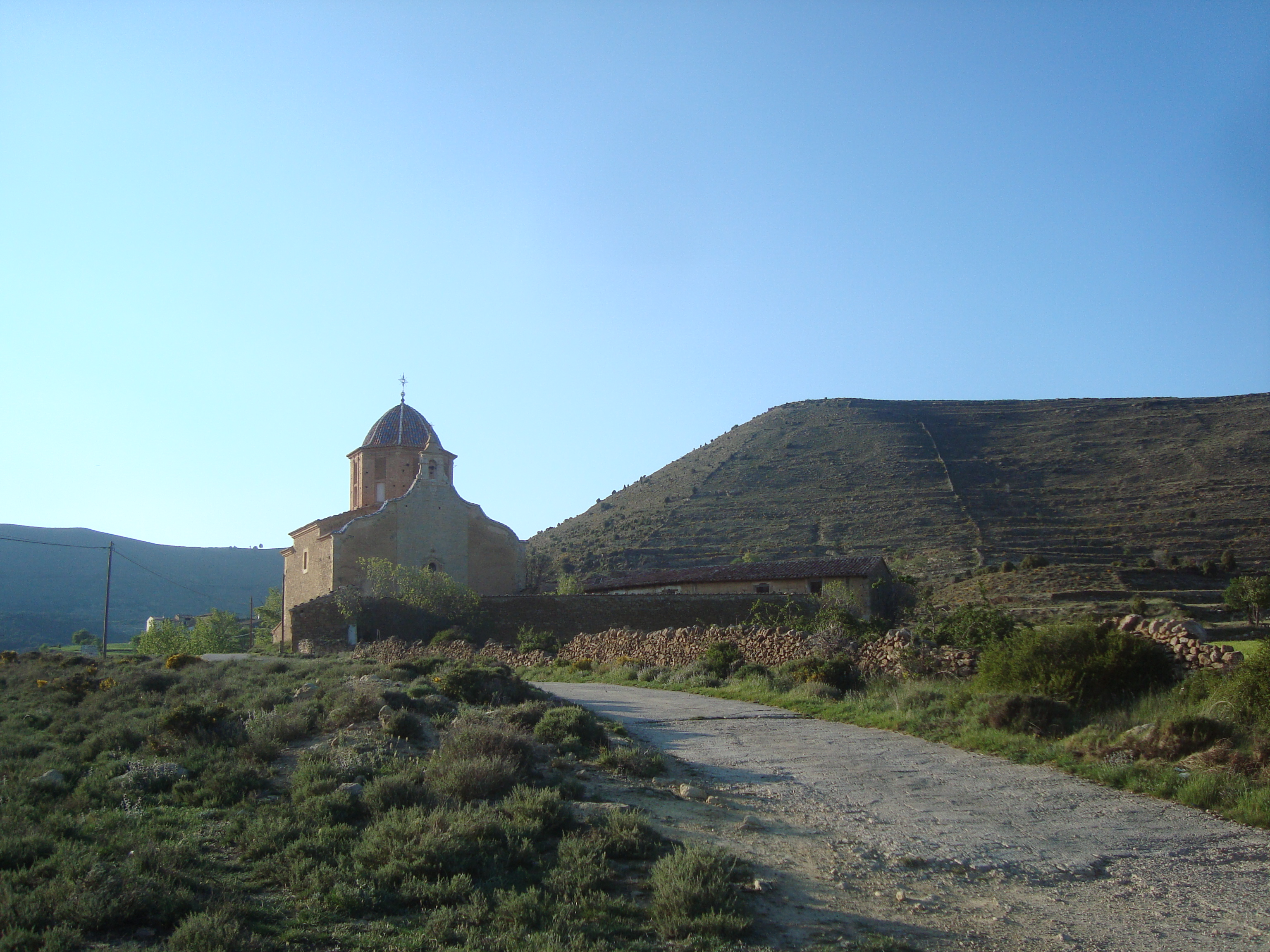 Ermitori de Sant Marc (Olocau del Rei) 01.083-003.